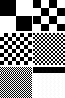 dérive de "Dithering example red blue.png" avec noir et blanc (la couleur pose d'autres problèmes)